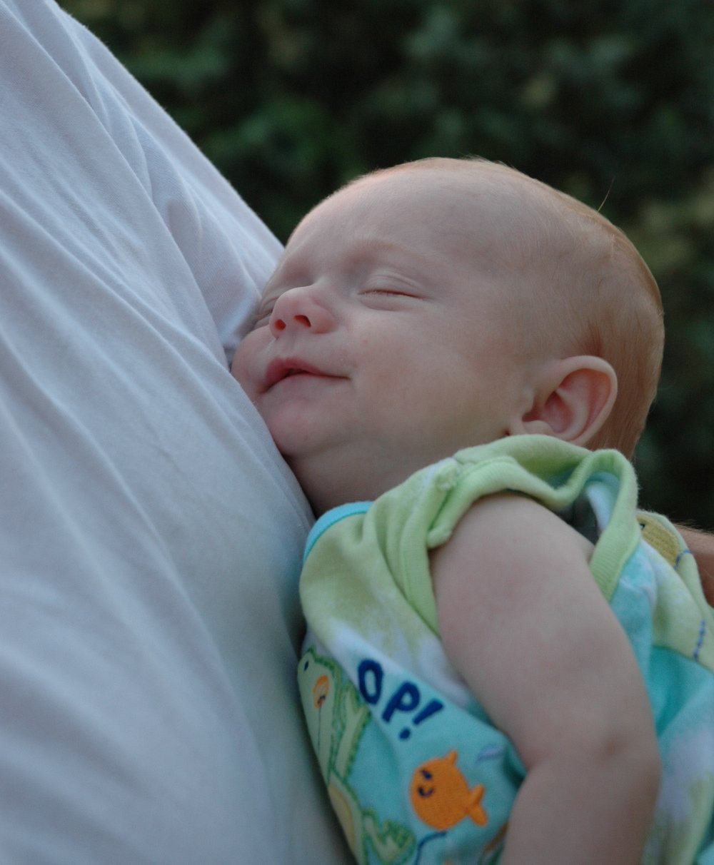 Calm